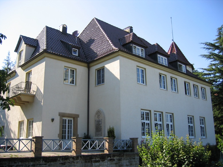 Corphaus Corps Stauffia Stuttgart